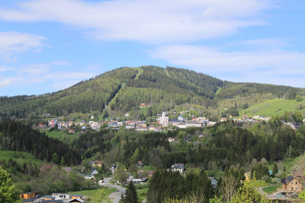 Mariazell vom JUFA-Hotel Sigmundsberg aus fotografiert